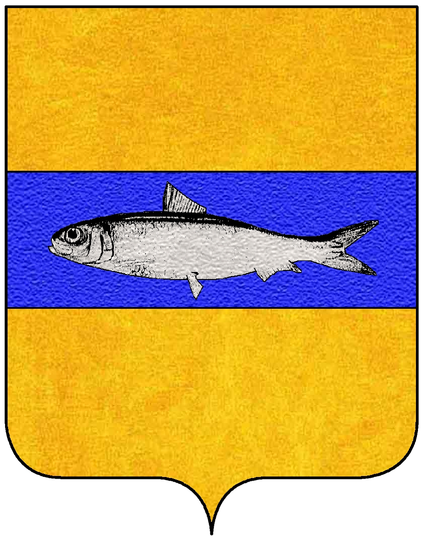 Stemma della famiglia Saracca (Saraka)